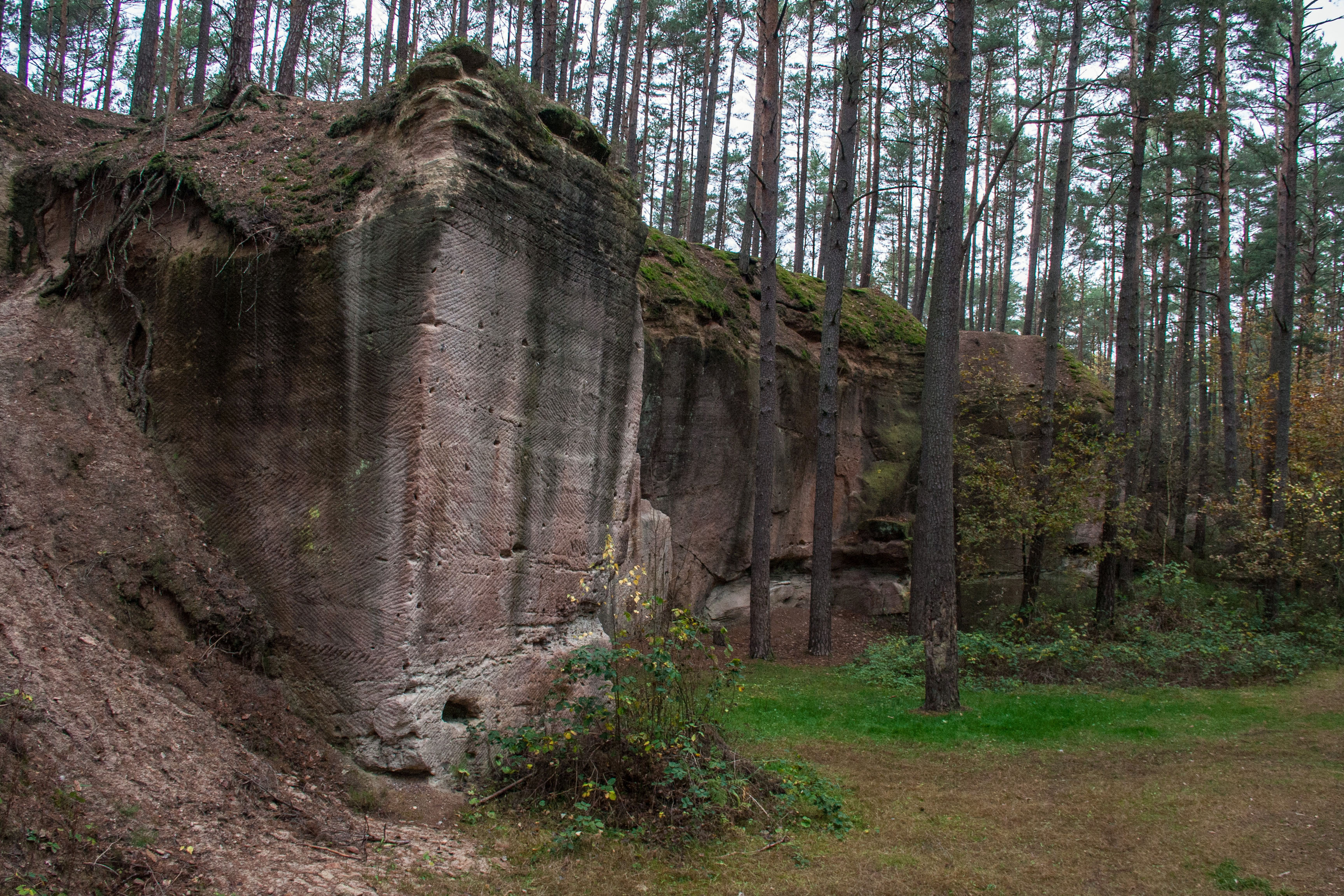 Historische Steinbrüche Wernsbach